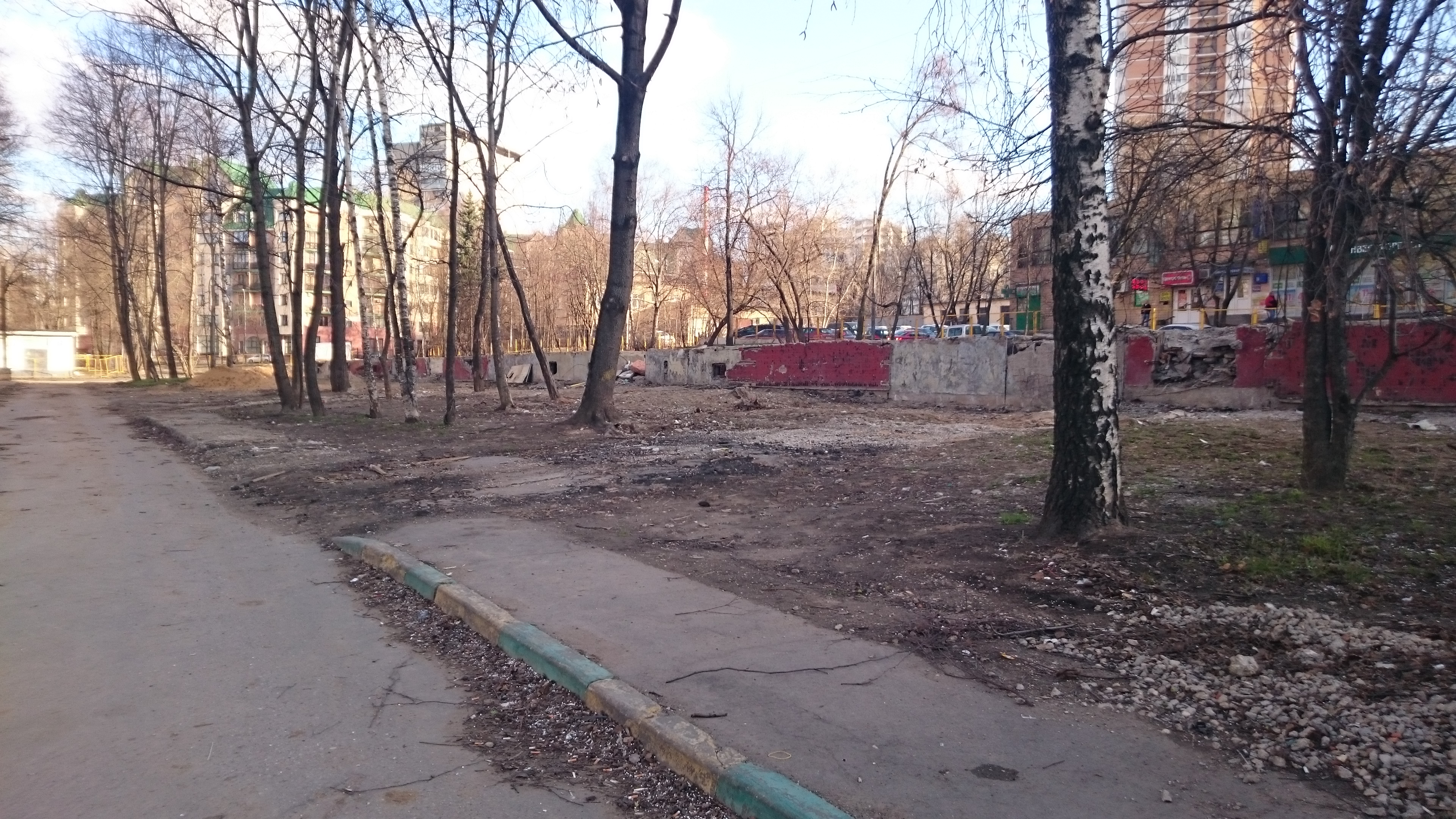 2015 Снесенная пятиэтажка (Ярцевская 24 - на месте современного пиковского "ЖК Ярцевская 24"